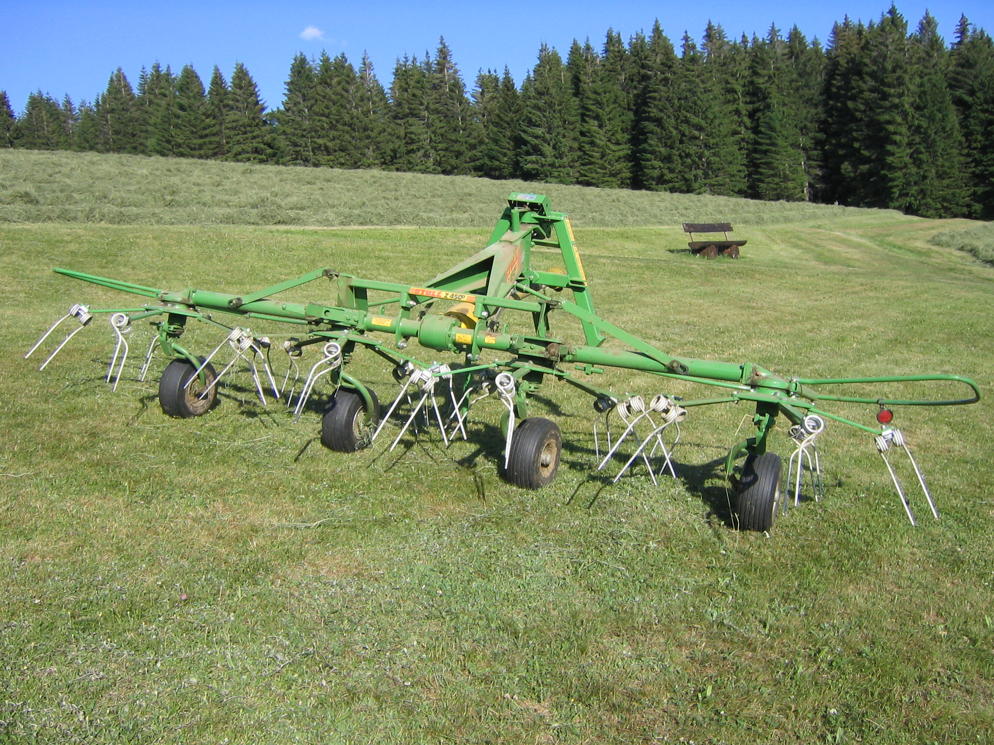 Heuwender Stoll Z450